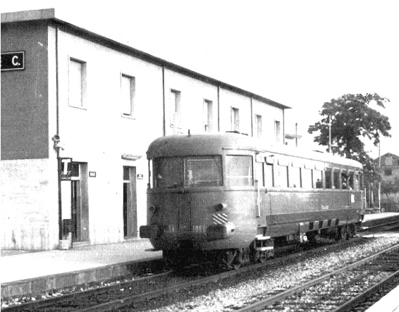 Immagine della stazione di Castiglione Cosentino nel 1970 con ALn 64 in sosta